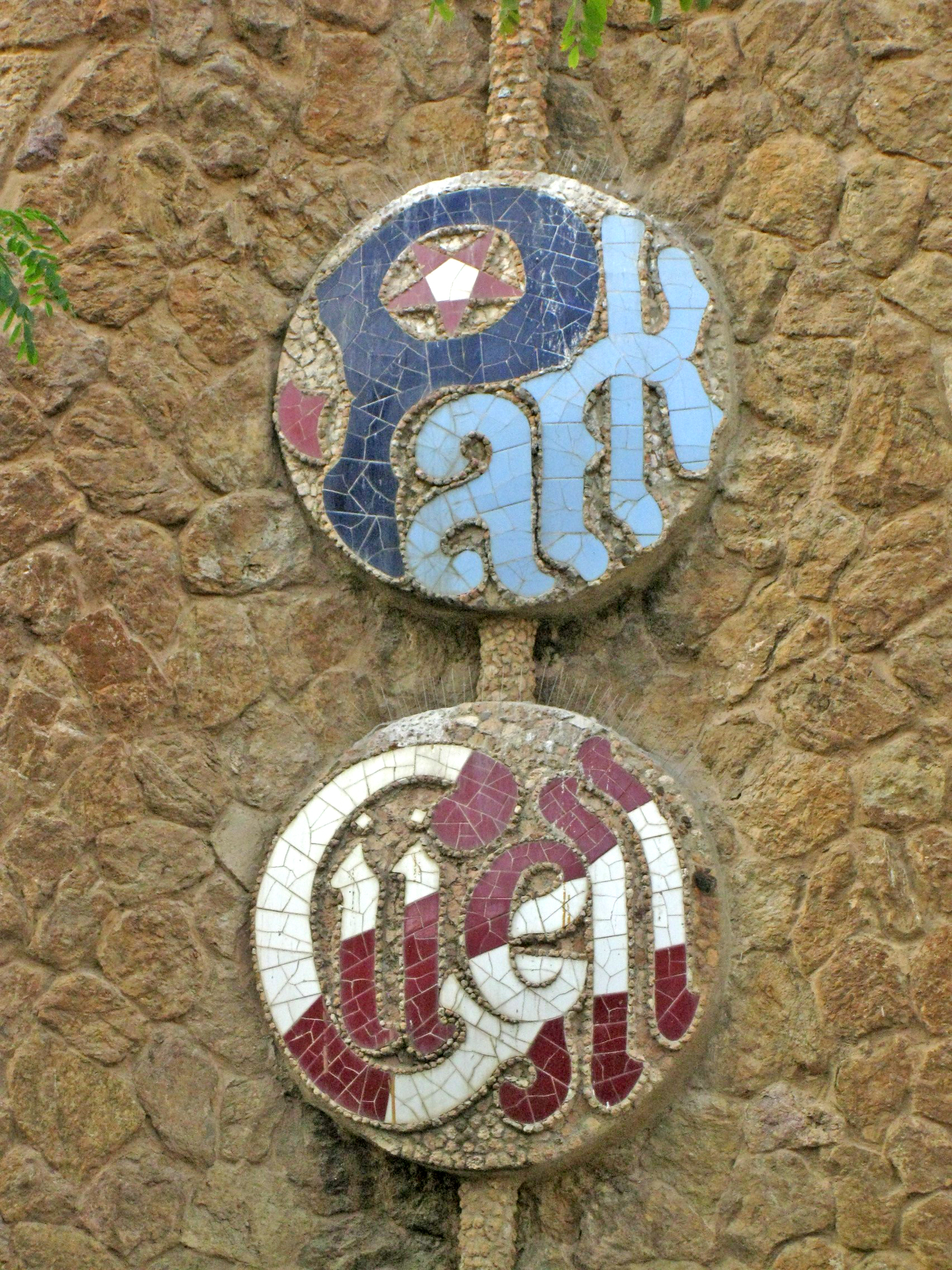 Parc Güell (Barcelona), medallons de trencadís amb el nom del parc a la façana de l'edifici petit de l'entrada; vista des del carrer d'Olot.